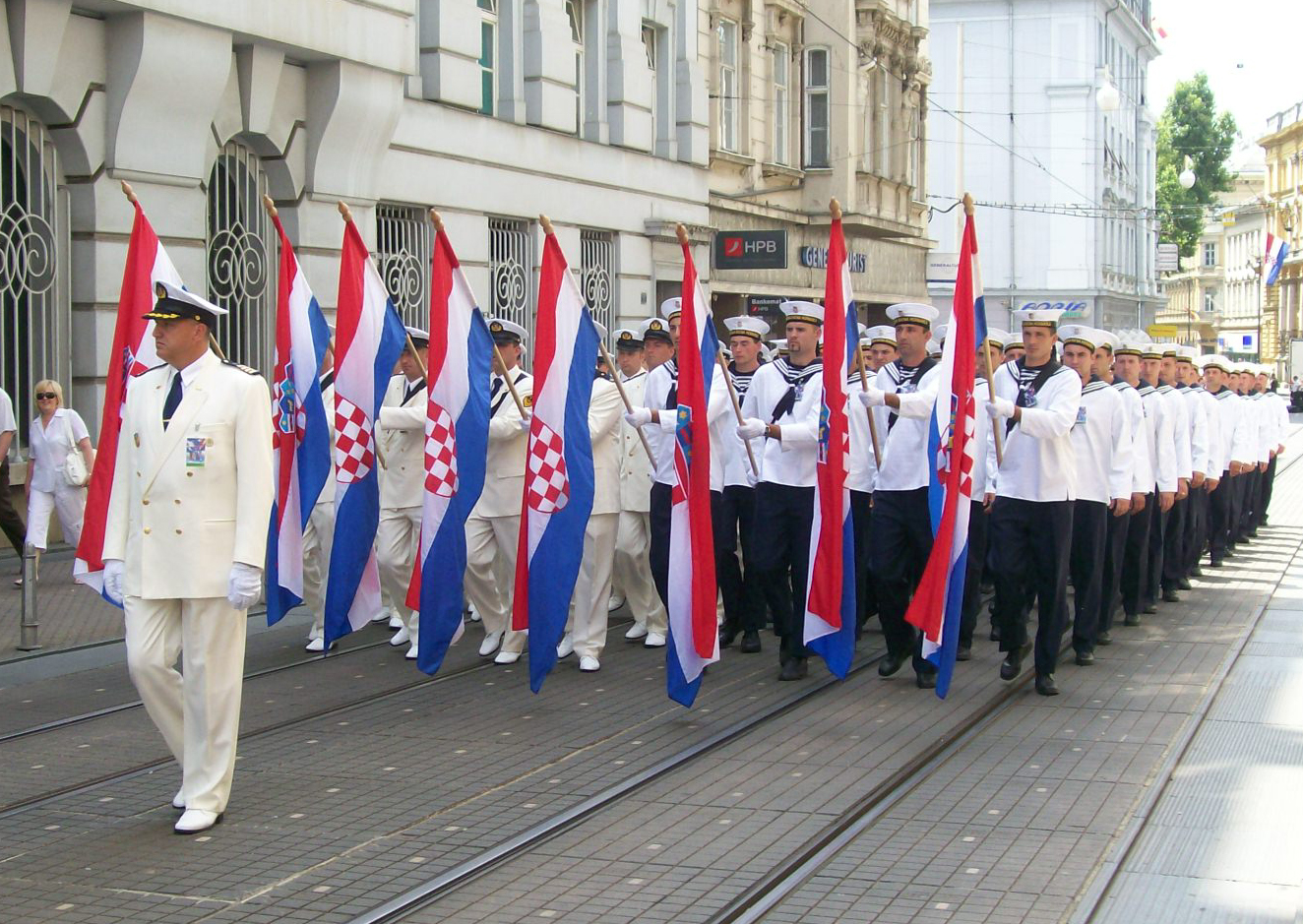 Ešalon Hrvatske ratne mornarice